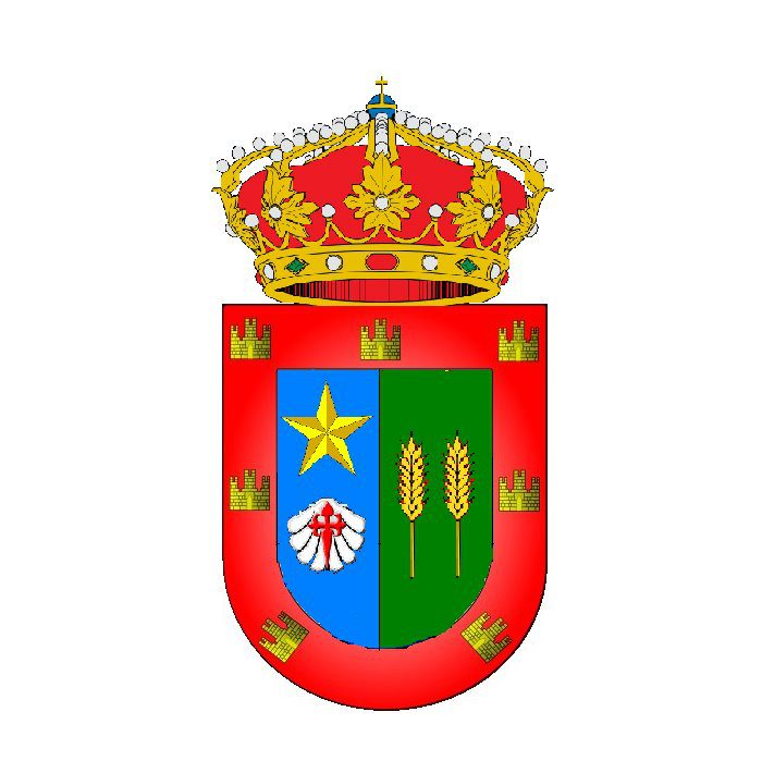 Escudo elegido por votación popular durante la Semana Santa de 2012 en el pueblo de Arconada. Votación propuesta por la Asociación Cultural "Los Codines". Escudos propuestos en el concurso realizados por Jesús Maroñas y Andrea Fernández. Idea para la realización de este escudo de José Luis Antolín. Descripción: Escudo partido. 1º de azur con estrella de oro y venera de plata cargada con la cruz de Santiago en gules. (por la Virgen y por el Camino de Santiago) 2º en sinople dos espigas de oro (por el campo de cereal) Bordura de gules con 7 castillos de oro (por Castilla) Al timbre corona real cerrada (por España)